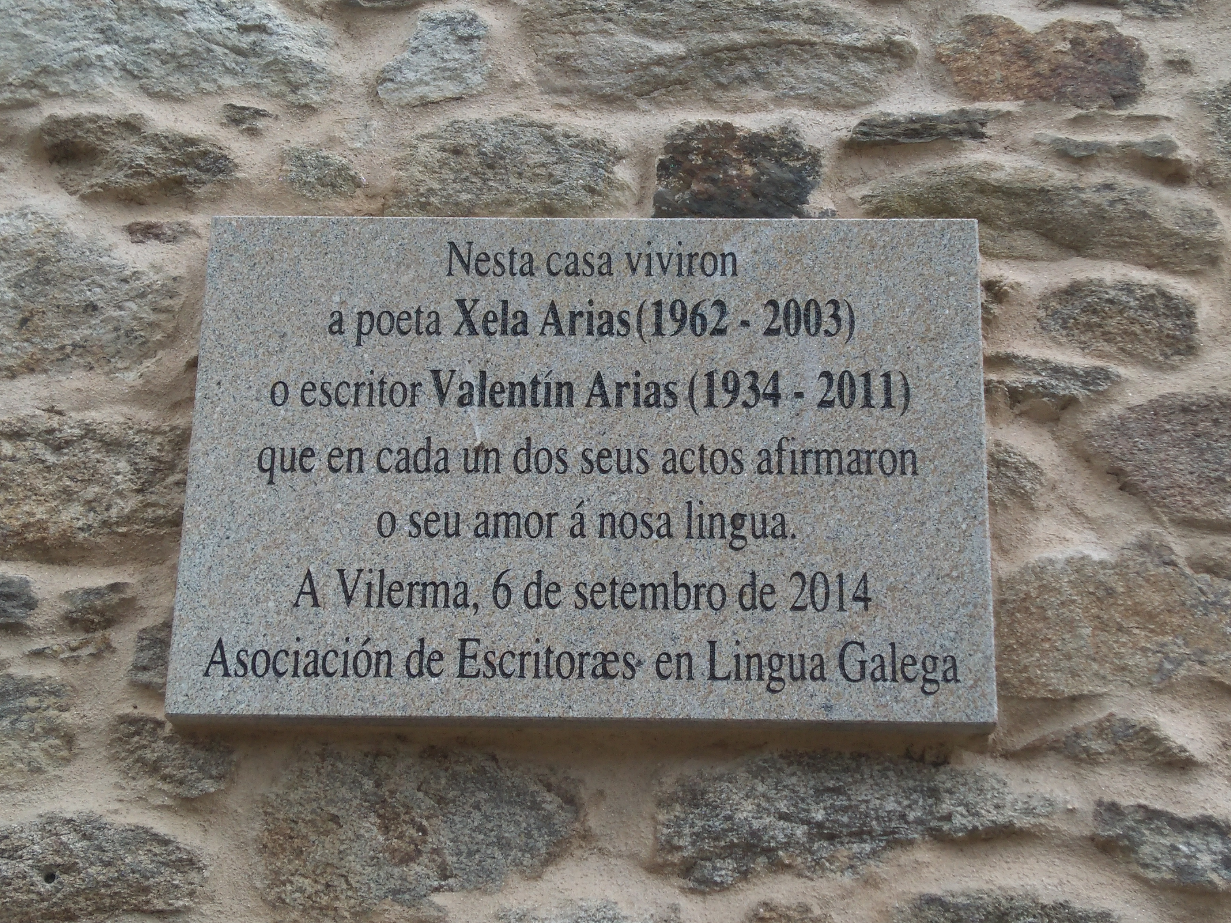 Placa conmemorativa en la vivienda en la que habitaron los escritores gallegos Xela Arias y Valentín Arias